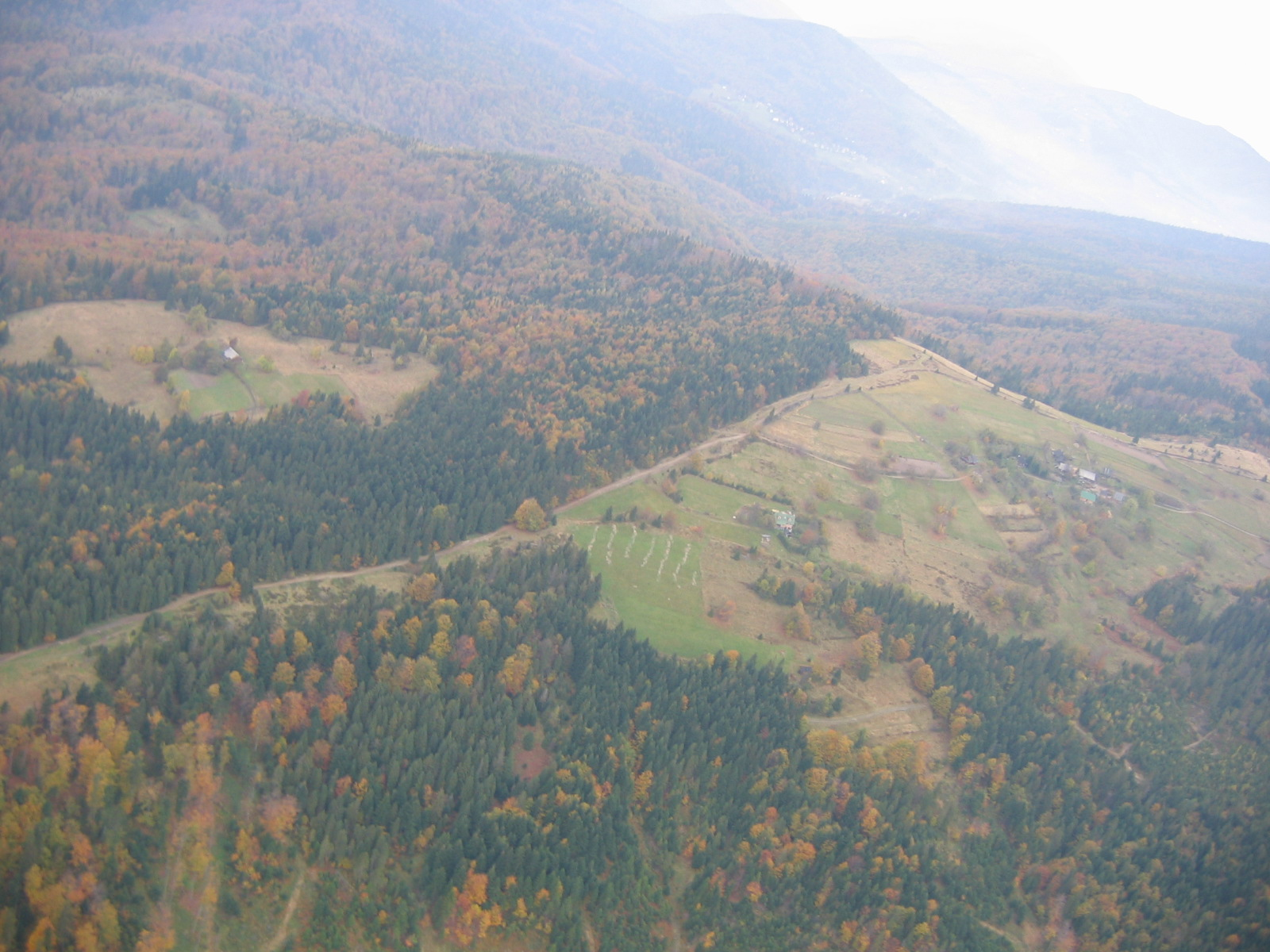 Widok polany podszczytowej na Potrójnej z lotu ptaka, zrobione z Pipera 1944rok produkcji, pilotował Andrzej Miciński. Data: 2005.10.21 Autor: Jan Podczaszyński - właściciel studenckiego schroniska "Pod Potrójną" (wyraził pisemną zgodę na opublikowanie zdjęcia w Wikipedii)